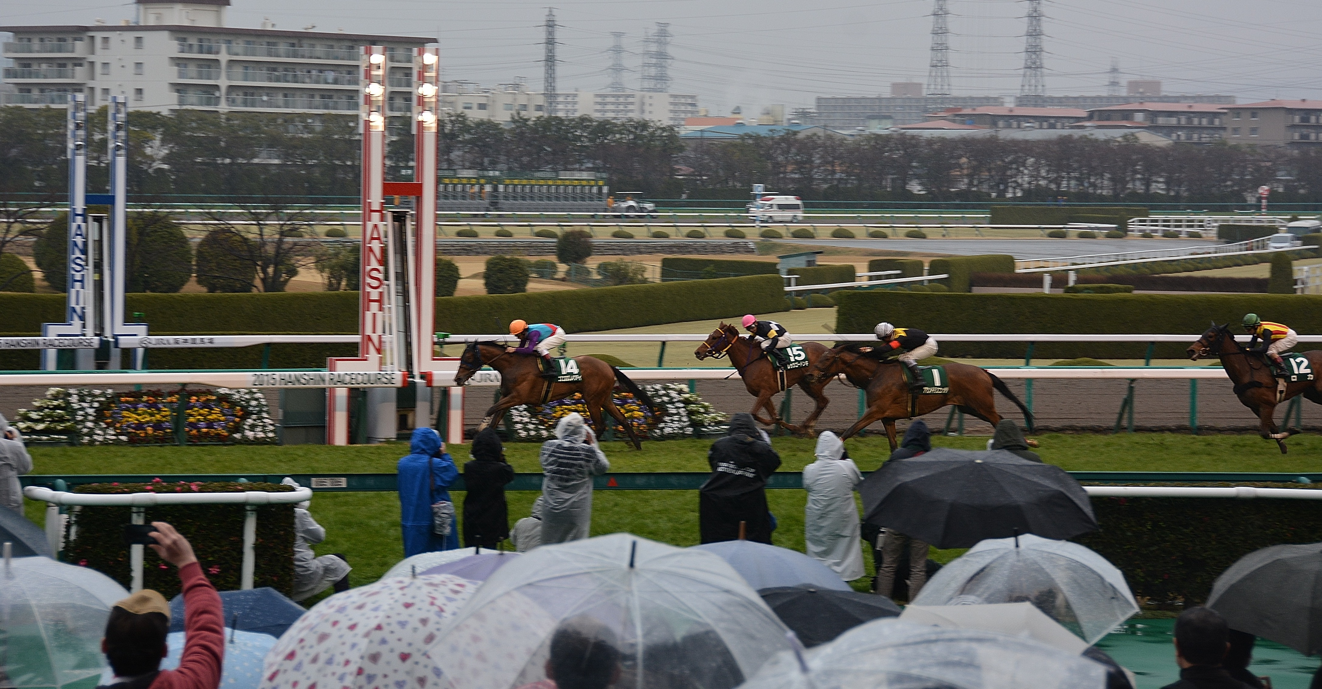 阪神競馬場で2015年3月7日（土）に、第11競走の「第22回チューリップ賞(GIII)」でゴールの瞬間を、観客席から撮影したもの。